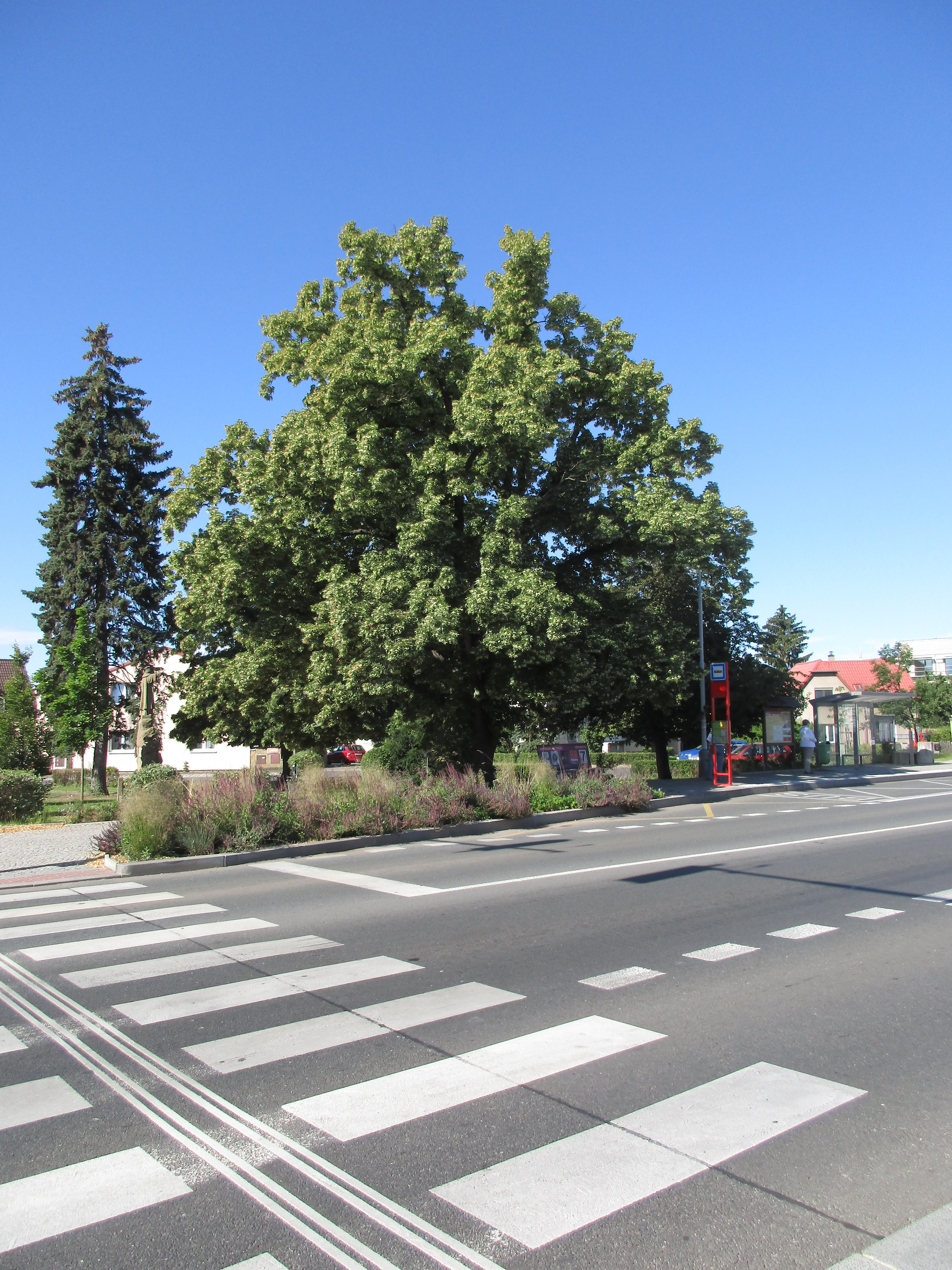 Lípa malolistá (Tilia cordata). Praha 9 - Běchovice.